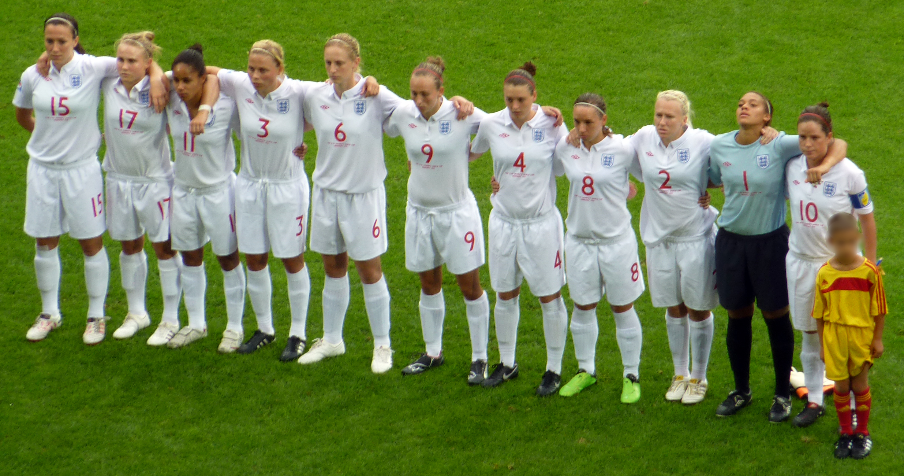 FIFA U-20-Fußball-Weltmeisterschaft der Frauen 2010, Englische Nationalmannschaft, Spiel 13 in Augsburg